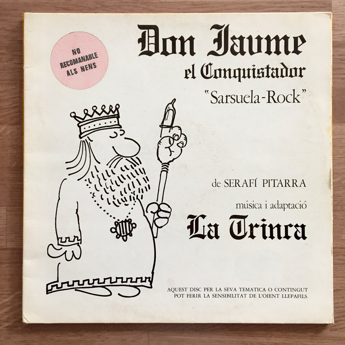 fotografia de la portada del disc Don Jaume de La Trinca, dibuixada per Perich